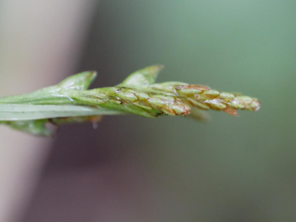 2019/06/09 愛媛県：Ehime Pref., Japan